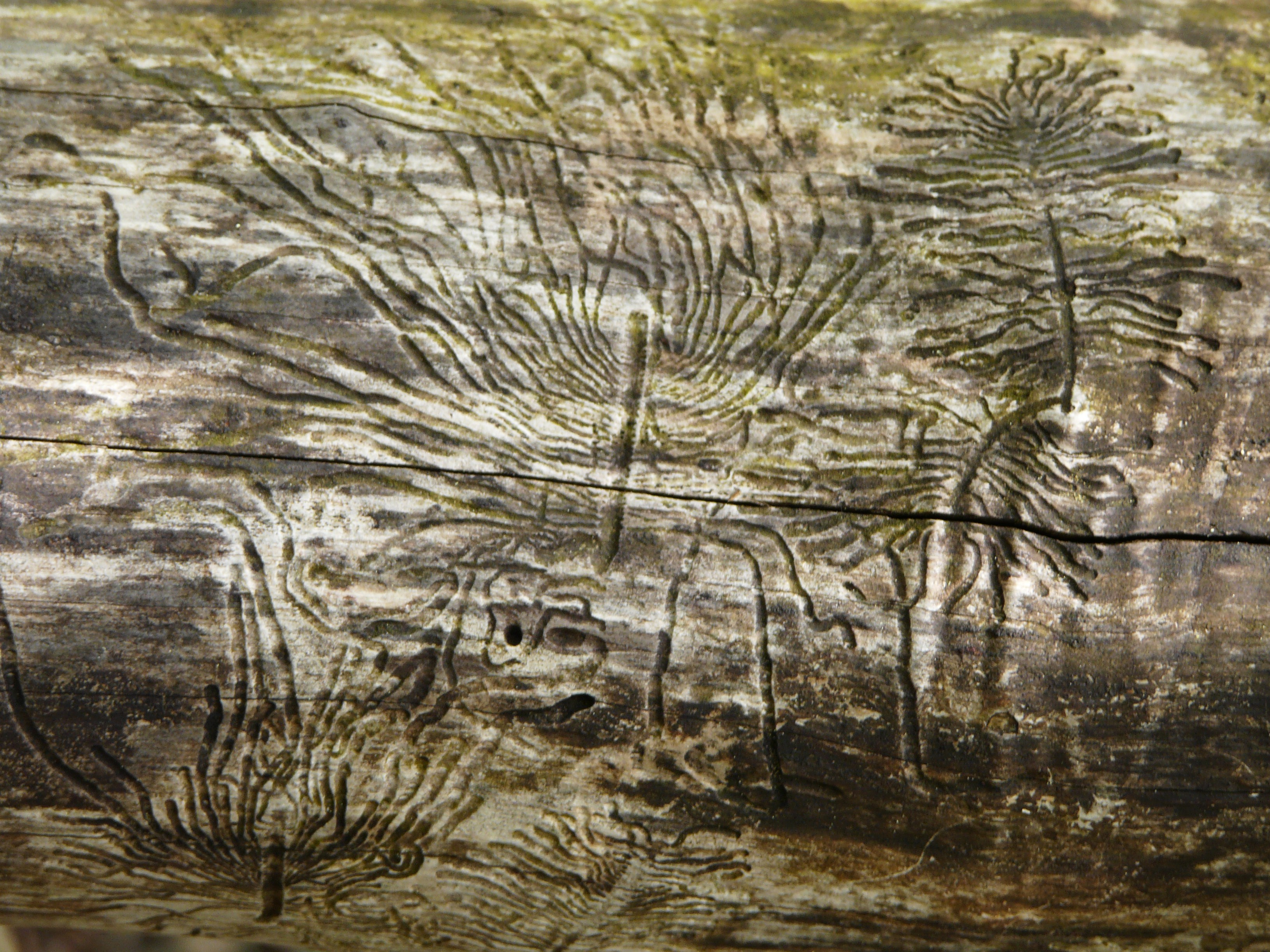 Galeries de scolytes sur un tronc d'arbre mort, Haute-Garonne, France.